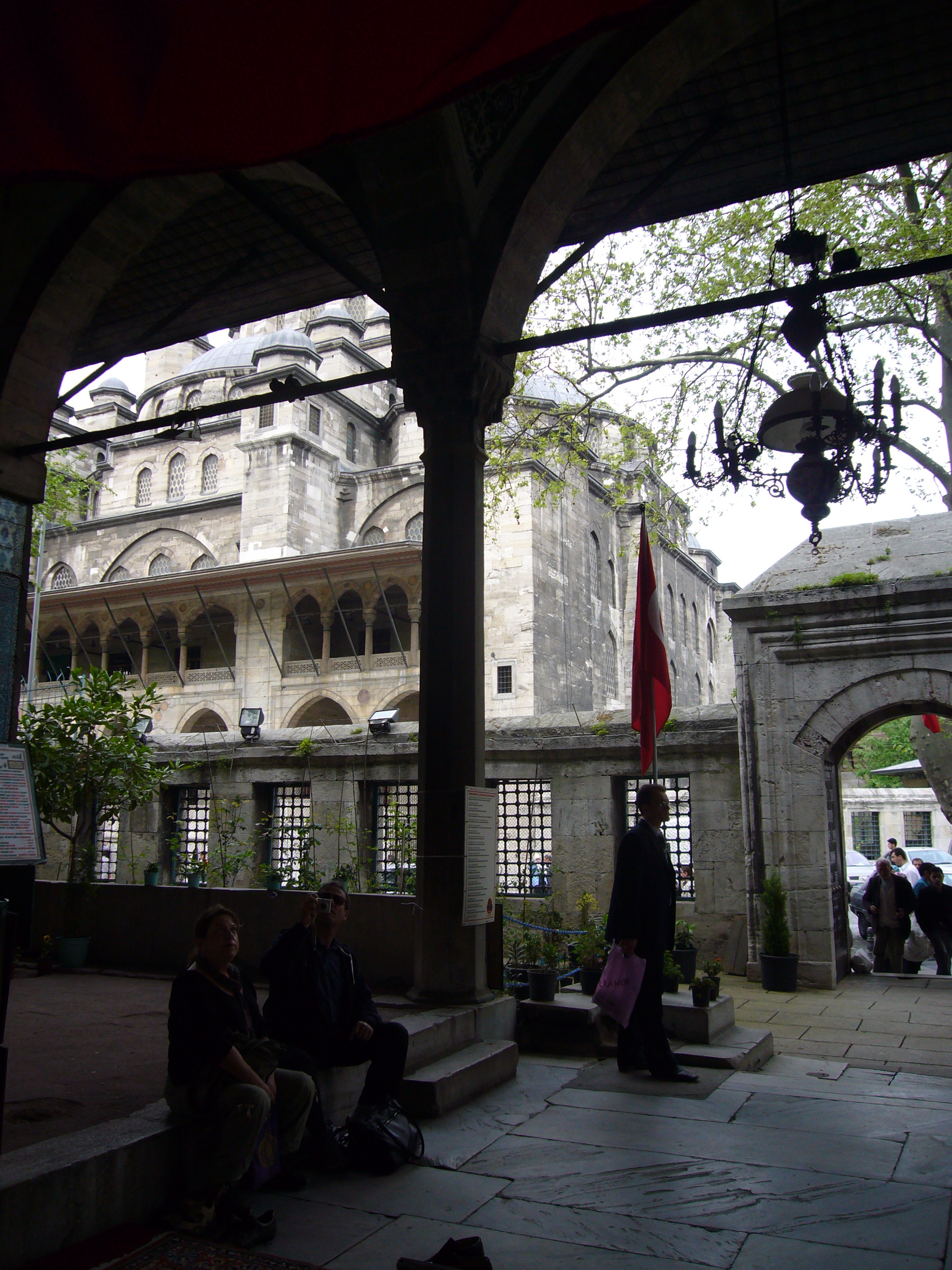 Istanbul, mausoleo di Turhan Hatice alla Yeni Cami, cortile